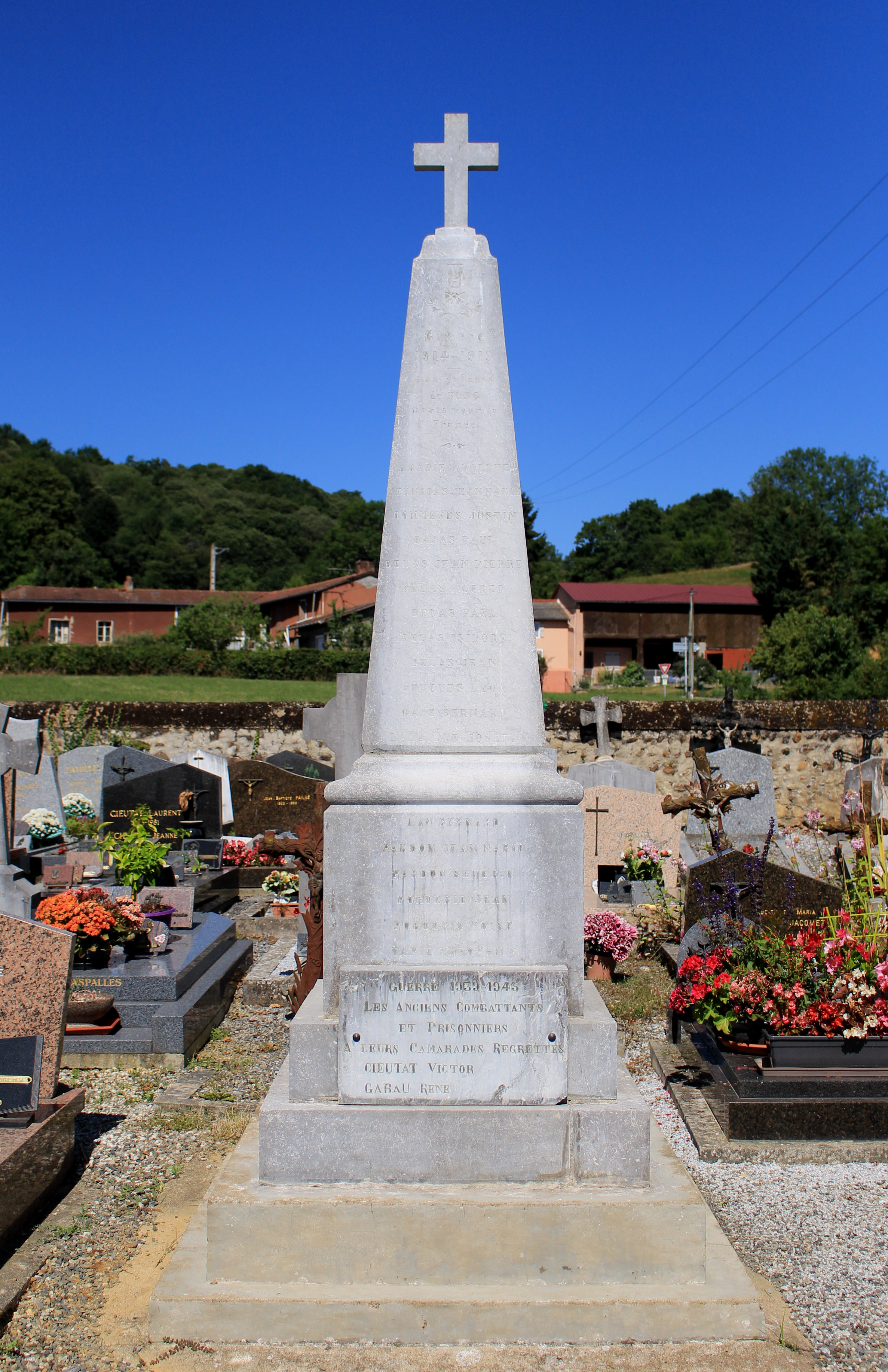 Monument aux morts de Burg (Hautes-Pyrénées)